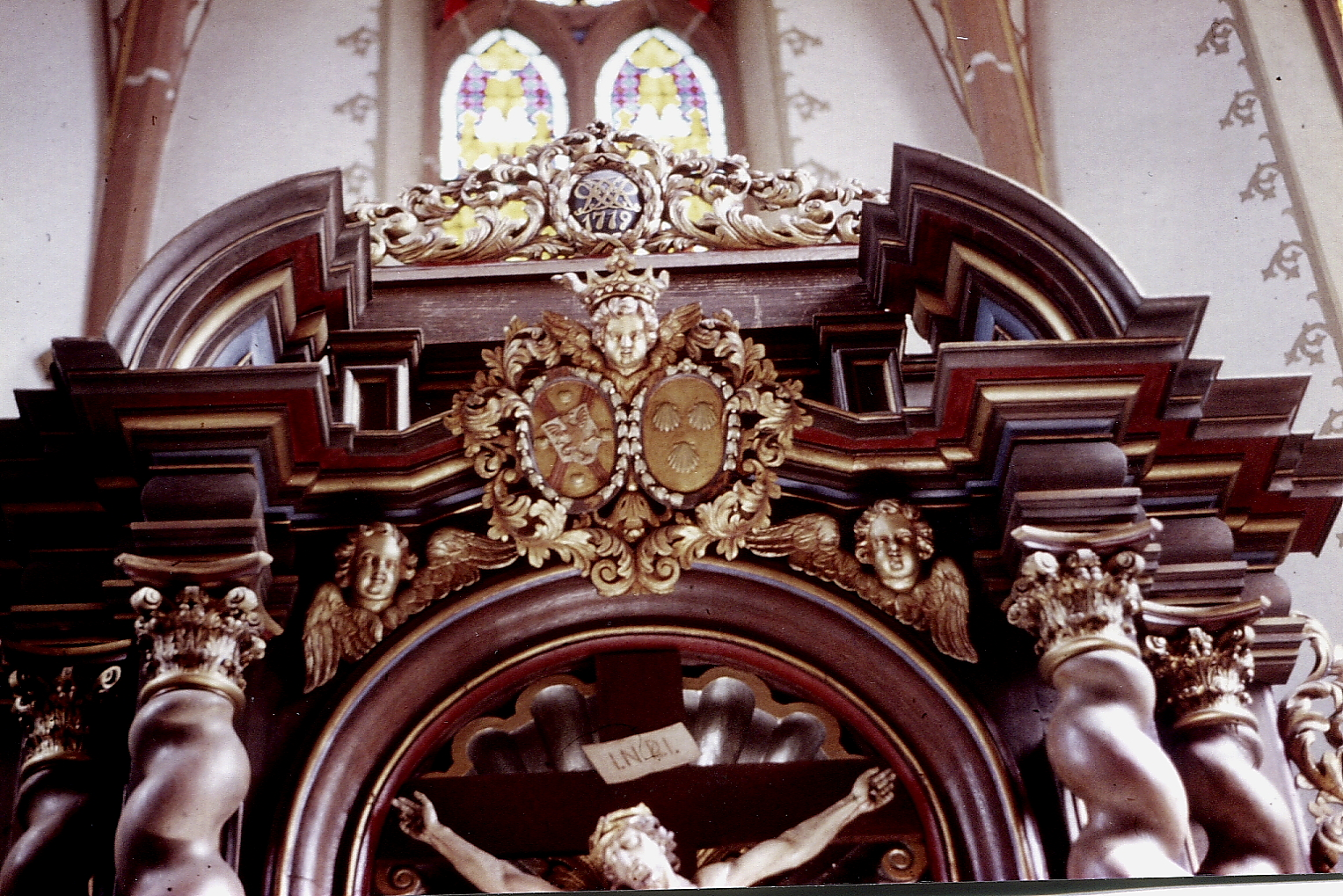 Ehewappen von Freiherrn Casimir Friedrich von Kesselstatt undAnna Klara Freiin von Metternich am Hochaltar in Lösnich